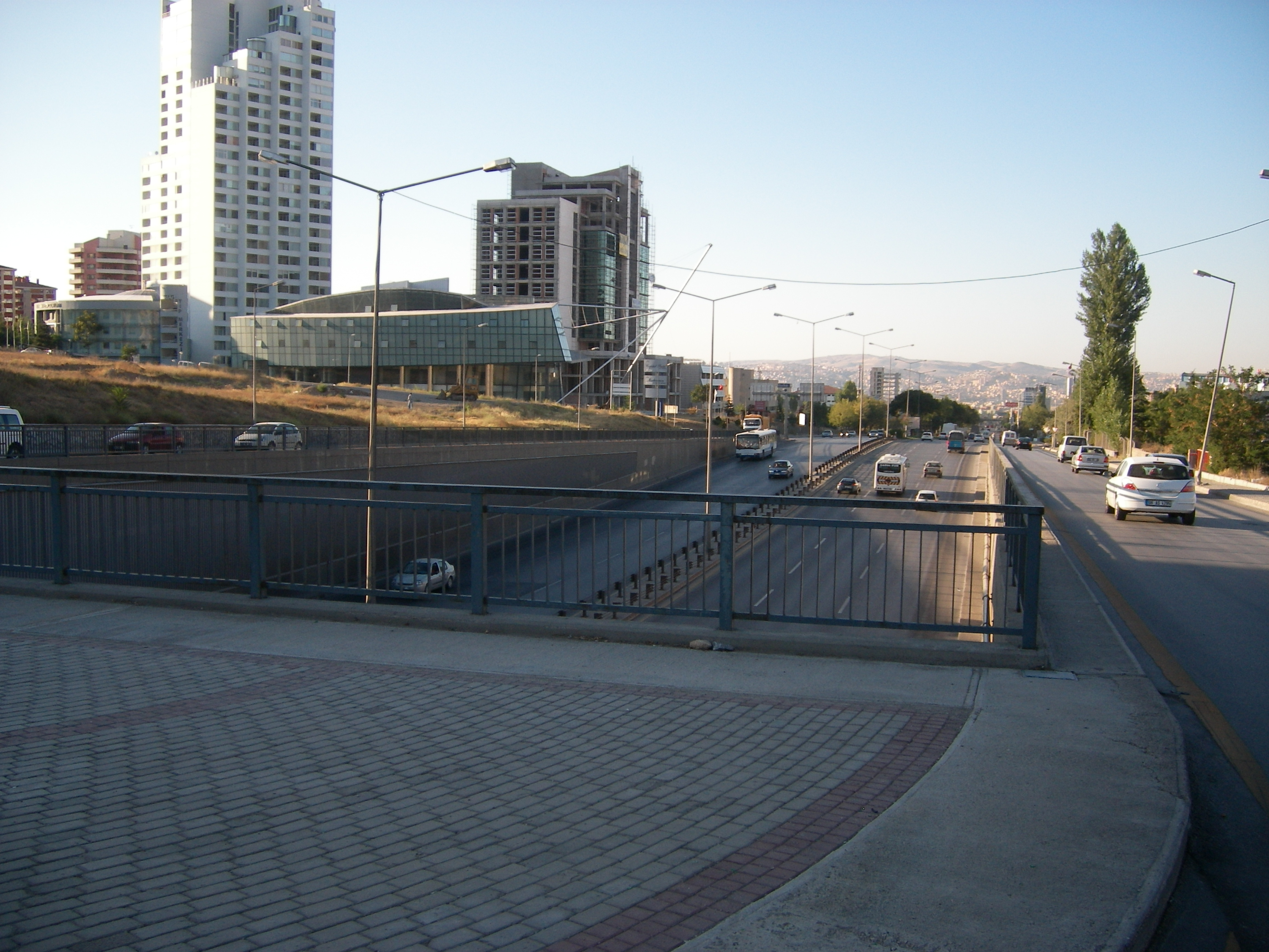 Ankara'dan çeşitli görüntüler